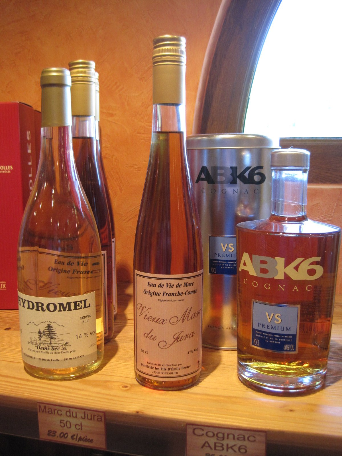 Bouteille de Vieux Marc du Jura - Eau de vie de Marc origine de Franche Comté